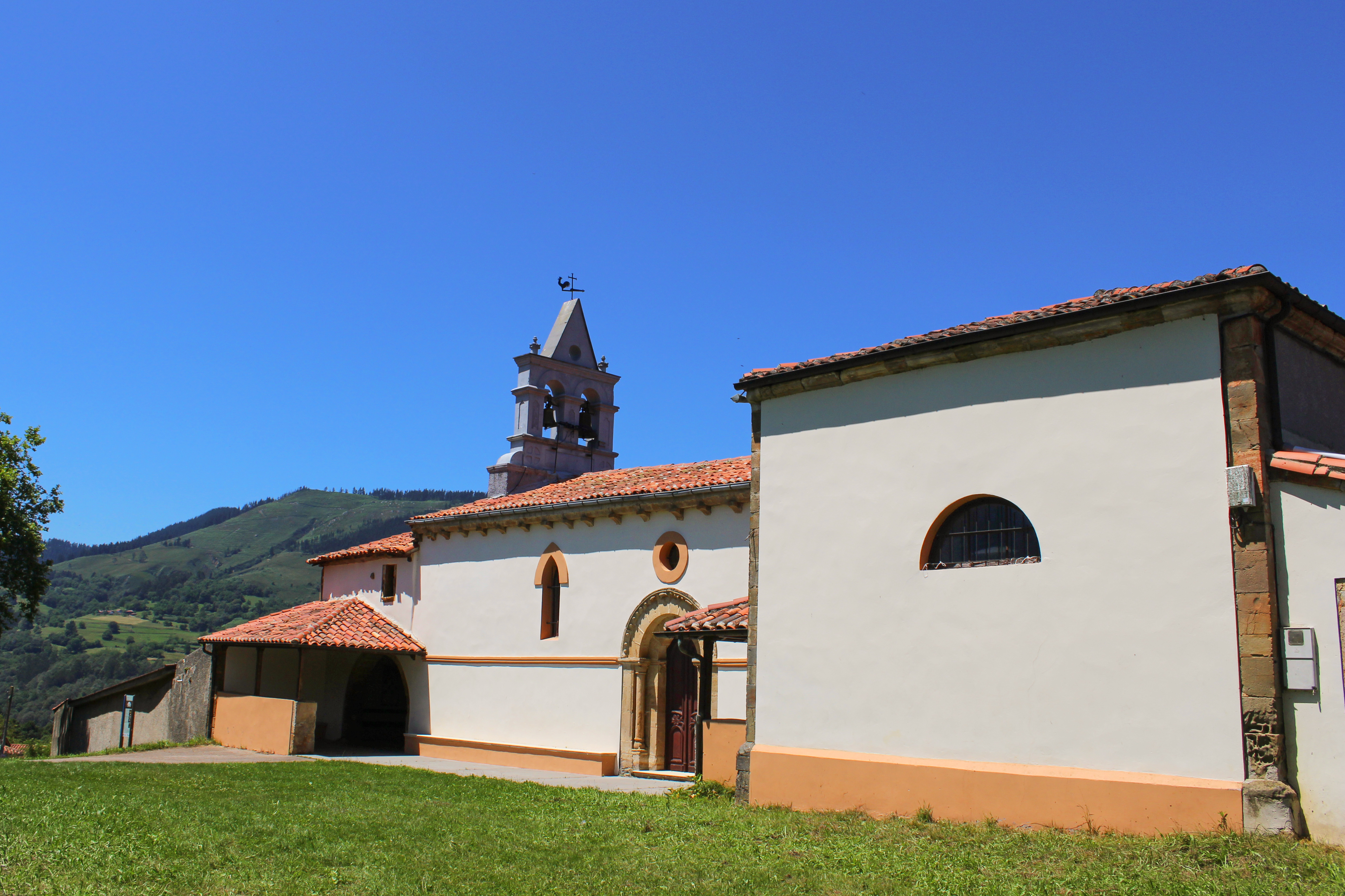 Beloncio (Piloña, Asturias)